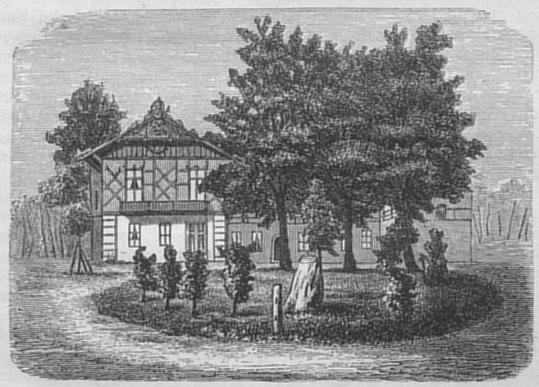 Jagdschloss Dreilinden, Berlin, Zeichnung Der Findling vor dem Schloss war der sog. „Runenstein", den Prinz Friedrich Karl von Preußen 1864 während des Feldzugs in Dänemark in der Nähe von Hadersleben gefunden hatte. Die Runeninschrift (8 Zeichen) wurde laut Ernst Friedel seinerzeit mit dem Eigennamen Hairulf oder mit eine[r] aus dem Geschlecht der Hairulfer übersetzt (S. 187). Hochgeladen Februar 2005 von Lienhard Schulz 18:28, 21. Feb 2005 (CET)